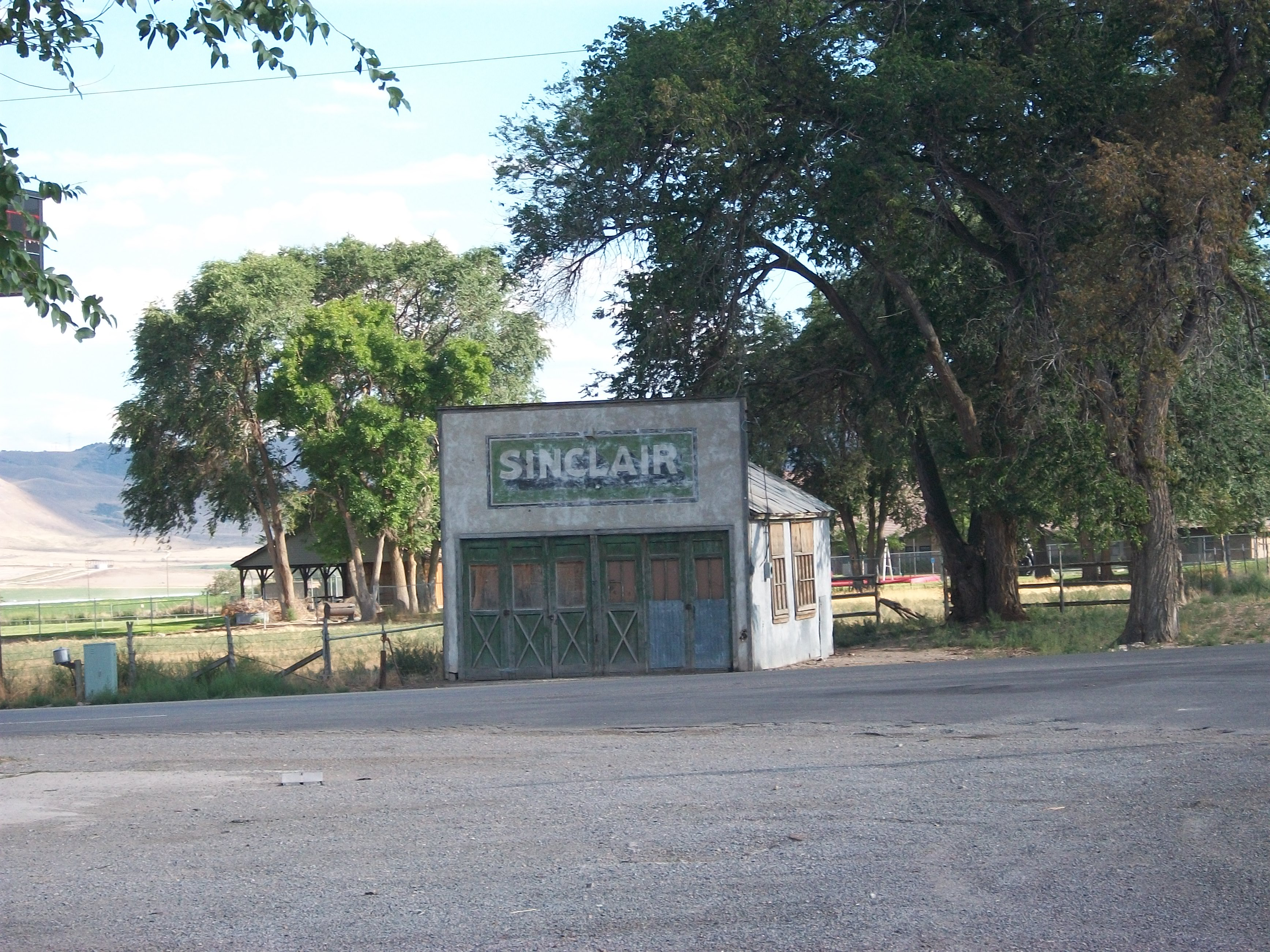 Abandoned Sinclair building in Elberta, Utah.